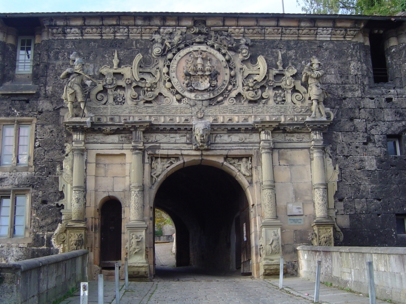 Hohentübingen - Äußeres Tor